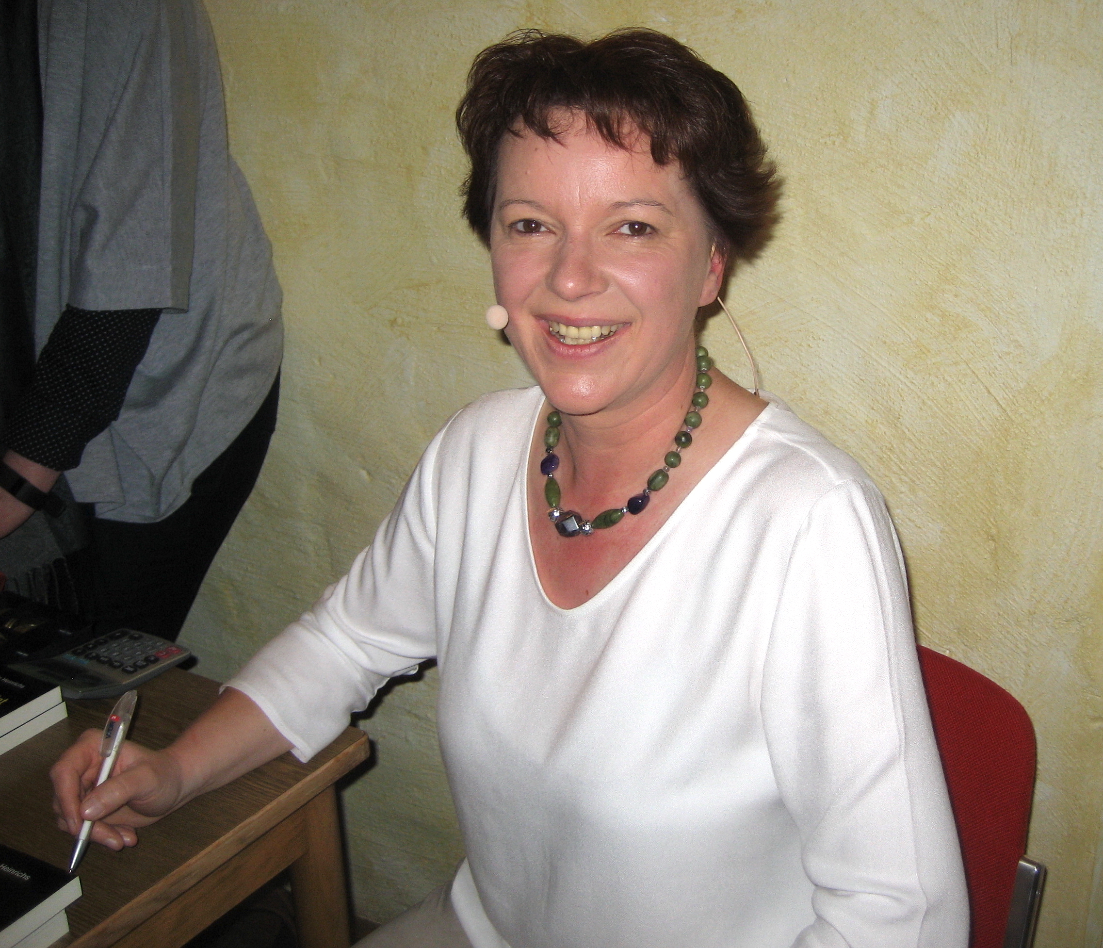 Schriftstellerin Kathrin Heinrichs beim Signieren ihres Buches Bis auf den Grund in Hemer.